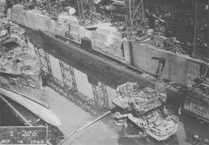 解体中の伊号第206潜水艦。播磨造船所呉船渠。